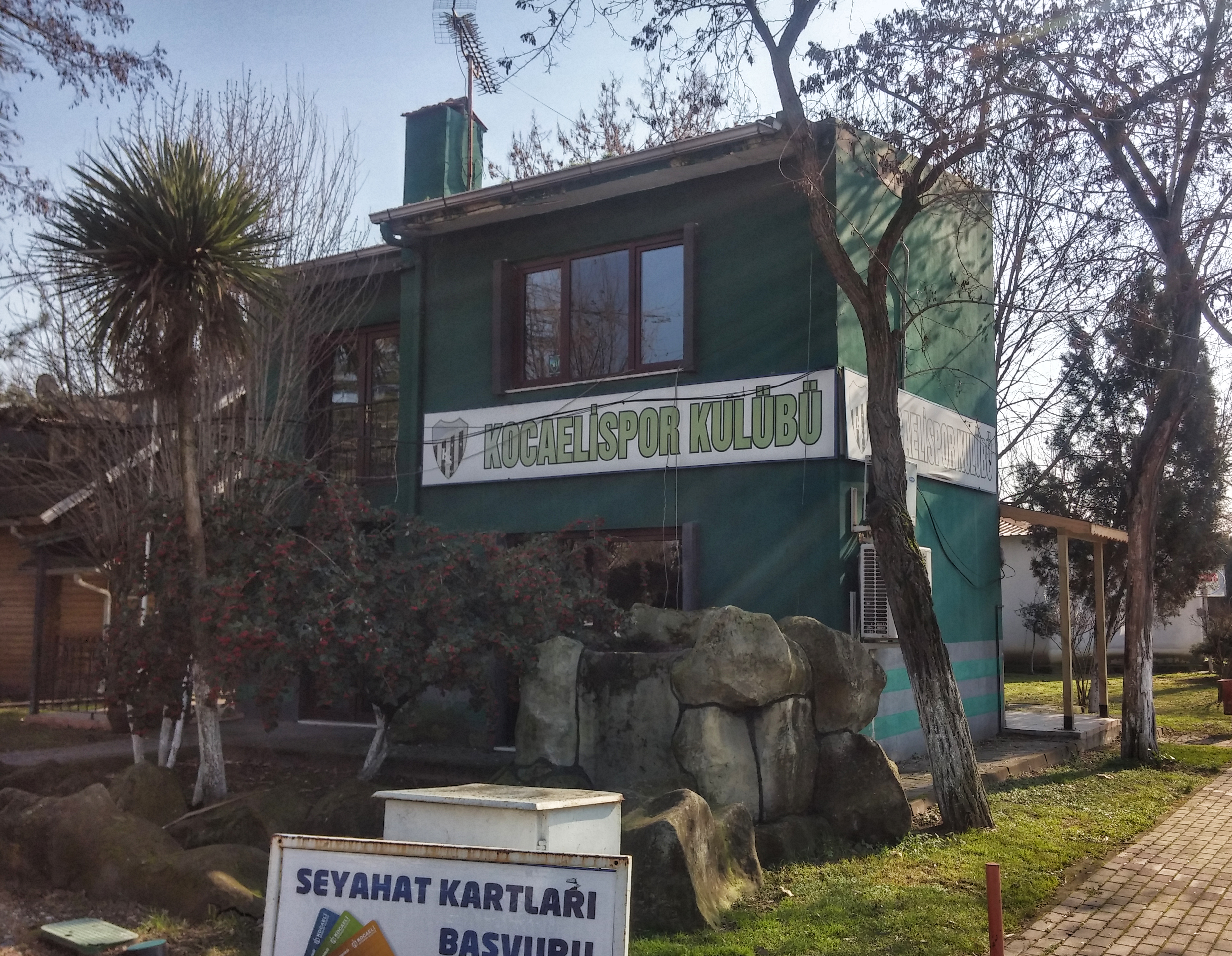 Kocaelisporun kulüp binası.